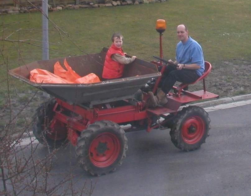 Muldenkipper („Vorderkipper“) von Potratz, Baujahr ca. 1965